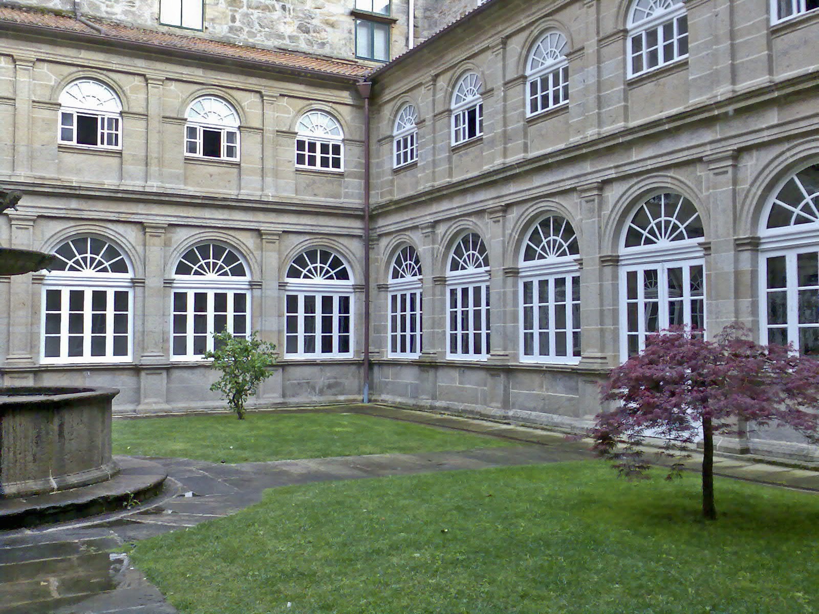 Claustro do Convento de San Francisco do Val de Deus en Santiago de Compostela- Galicia